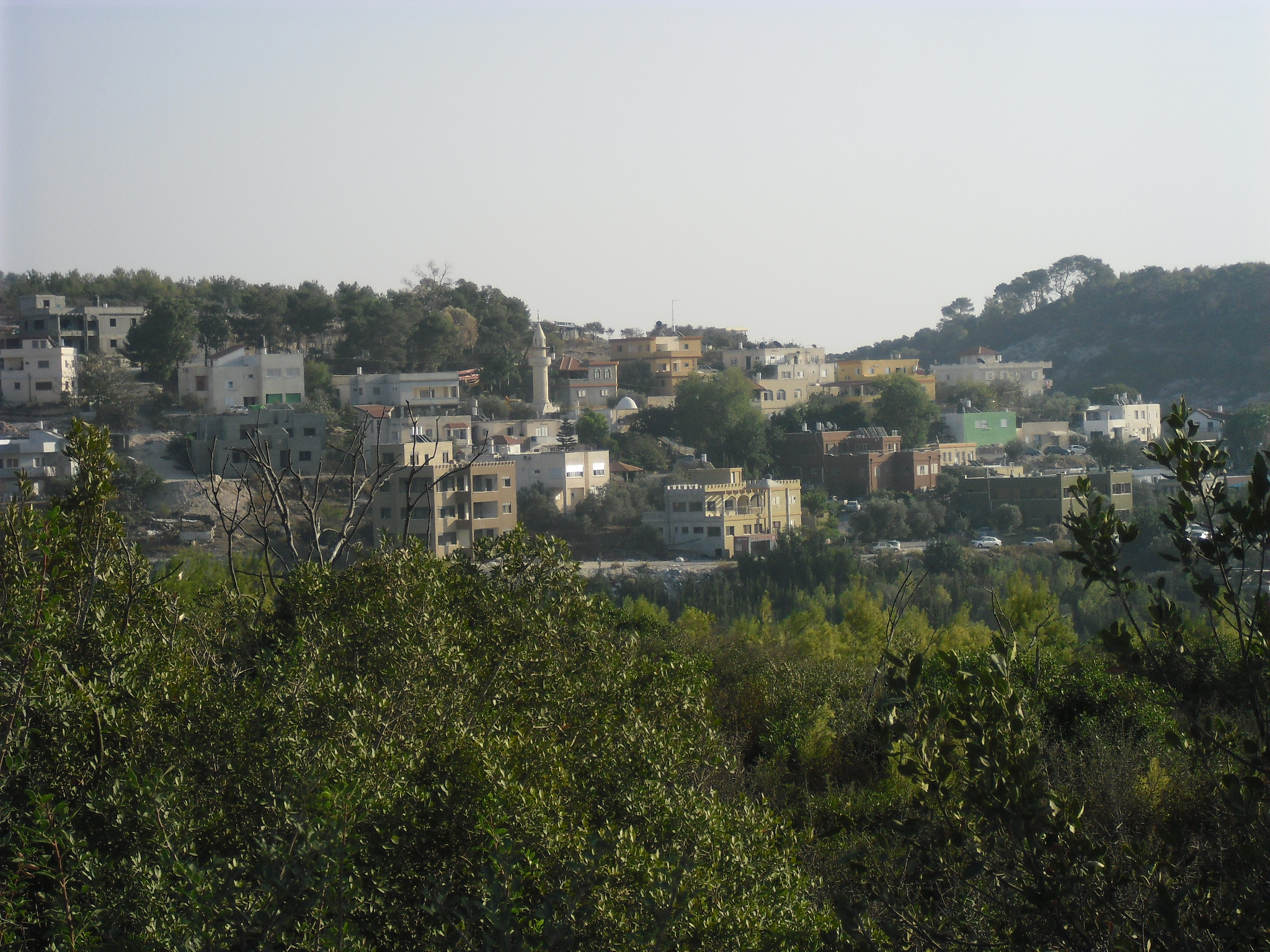 עין חוד